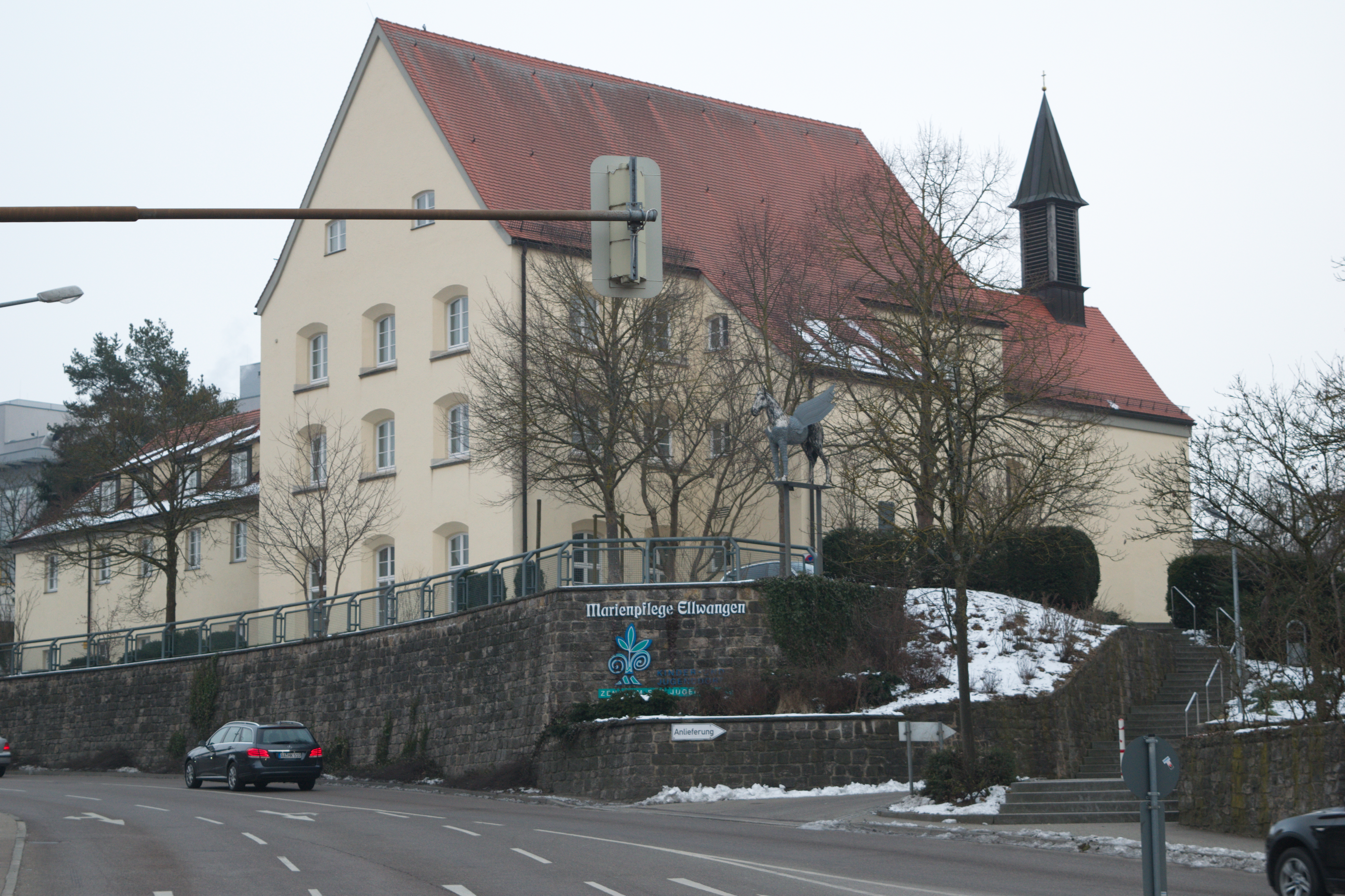 Marienstraße, Ellwangen